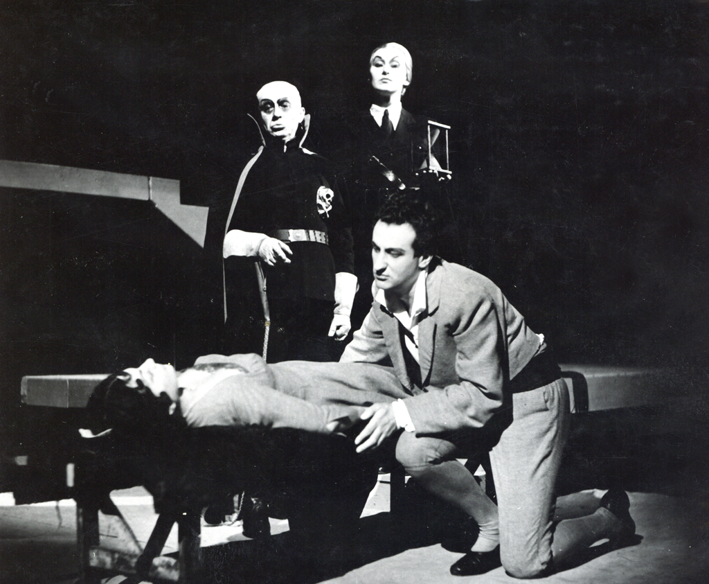 Albert Camus, Obsedno stanje, SNG v Mariboru. Na fotografiji: Mira Bedenk (Viktorija), Franjo Blaž (Kuga), Anton Terpin (Diego), Angelca Jenčič Janko (Smrt).